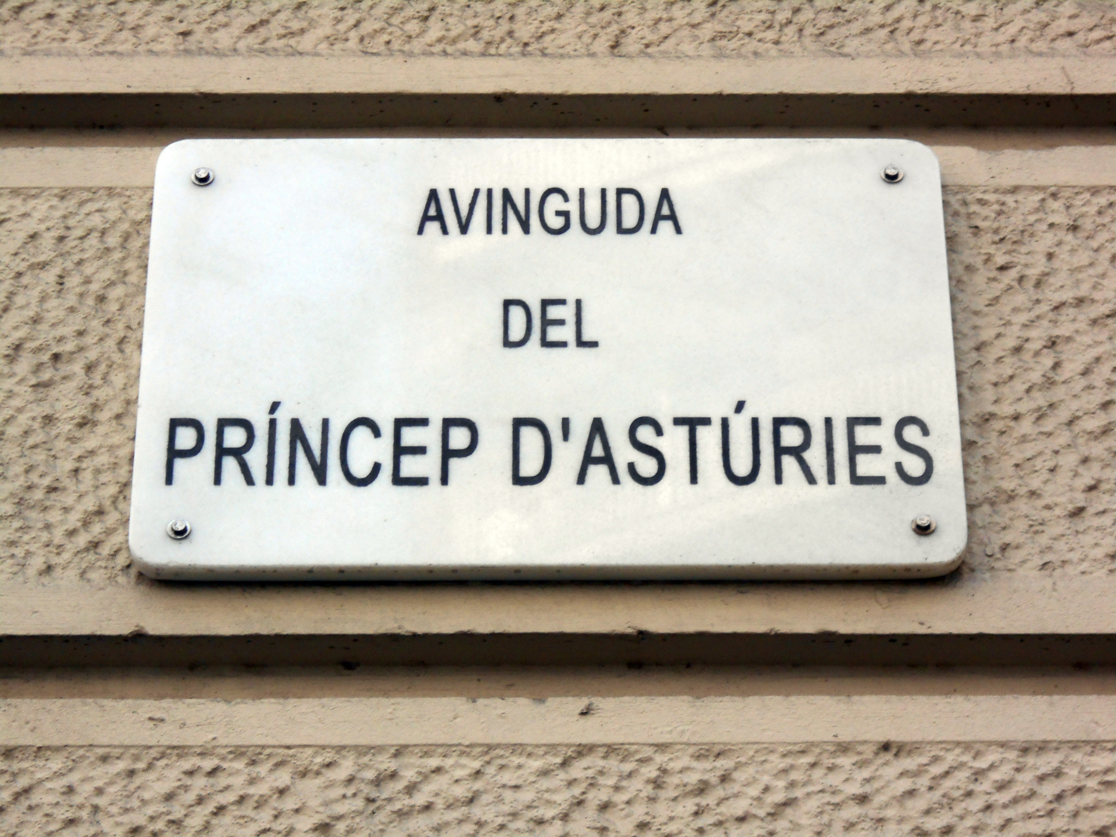 Avenida del Príncipe de Asturias.